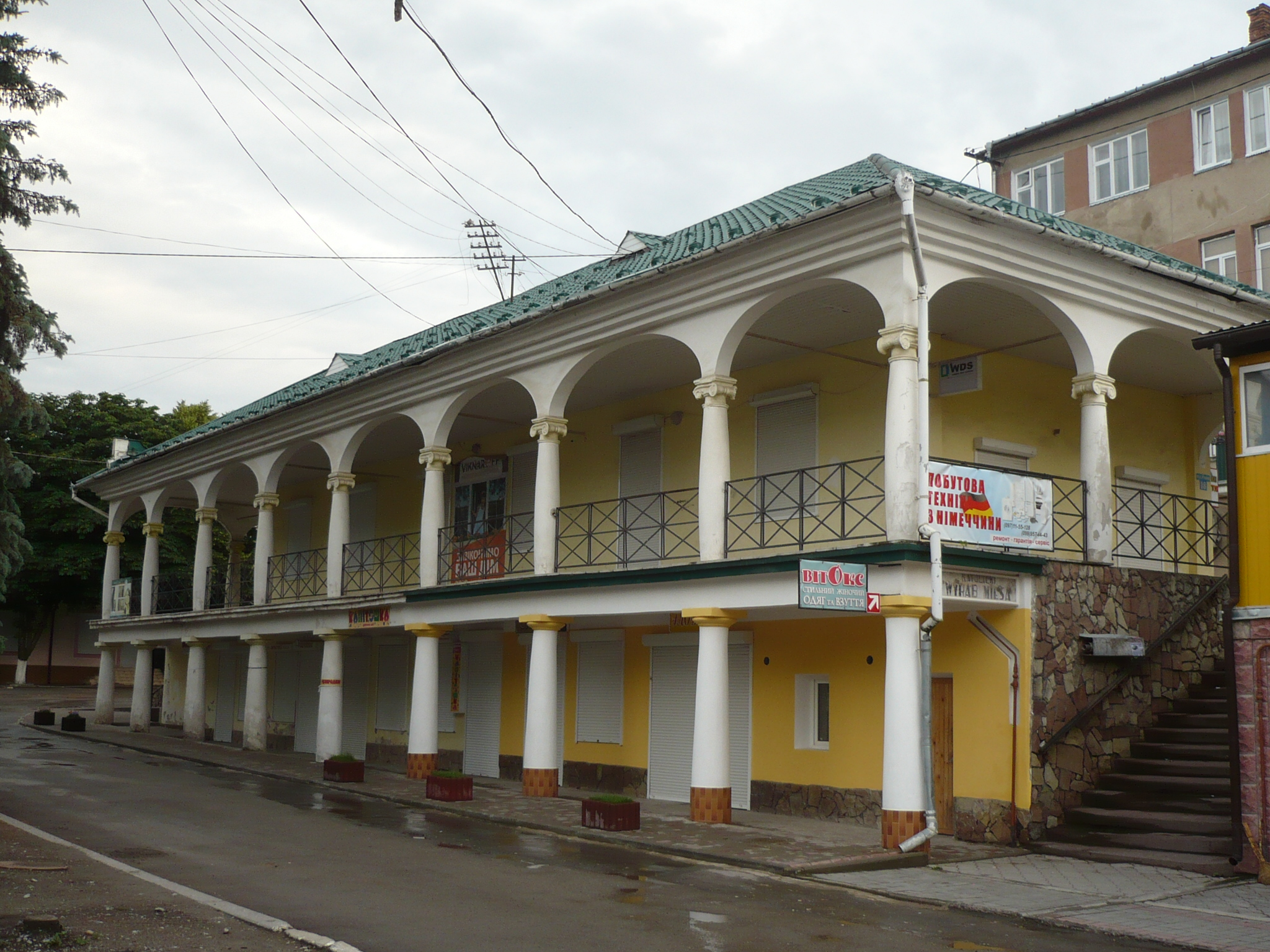 Czortków.Jatki